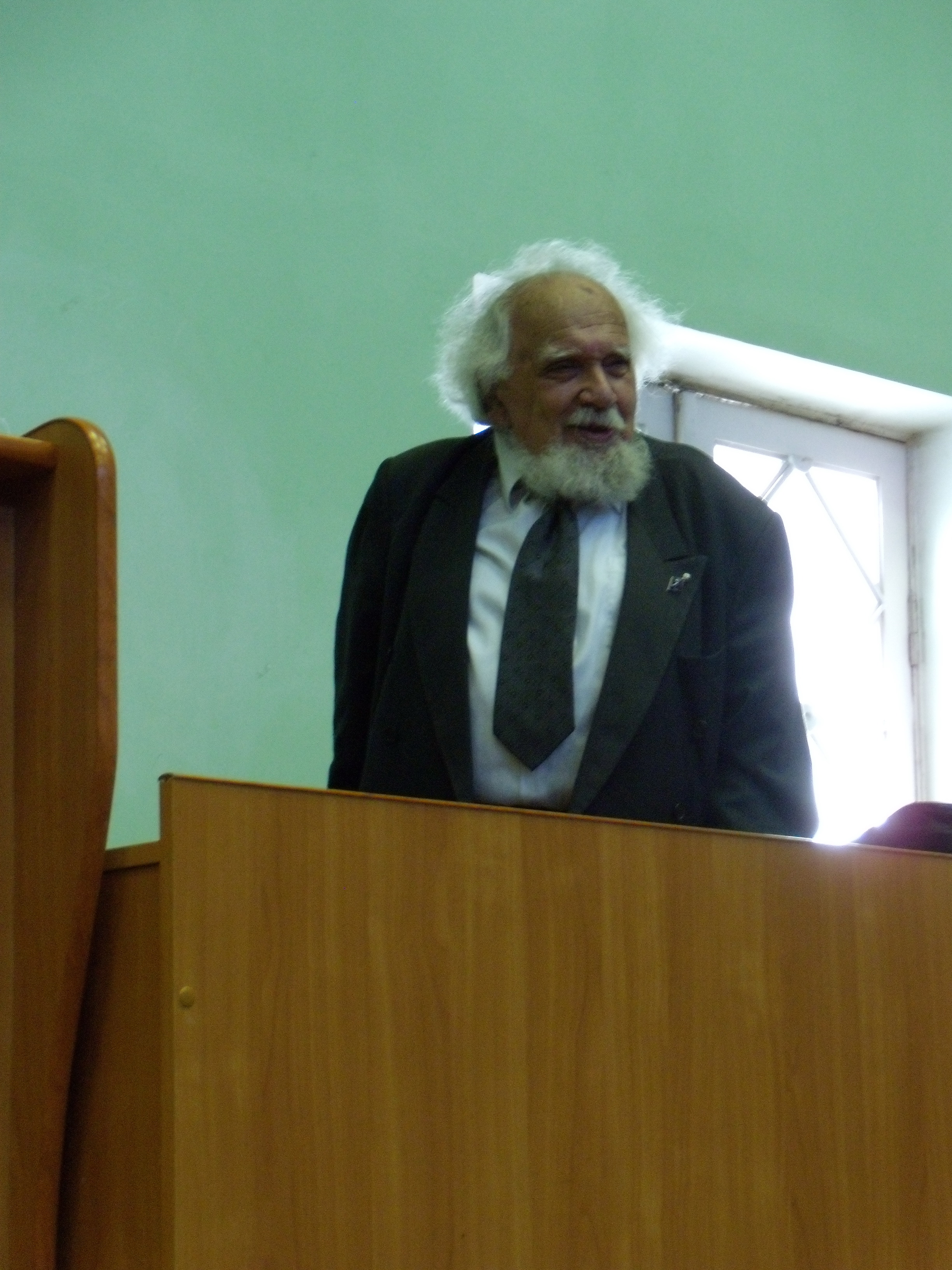 А.Д. Столяр, читает в лектории "Историю первобытного общества" первому курсу